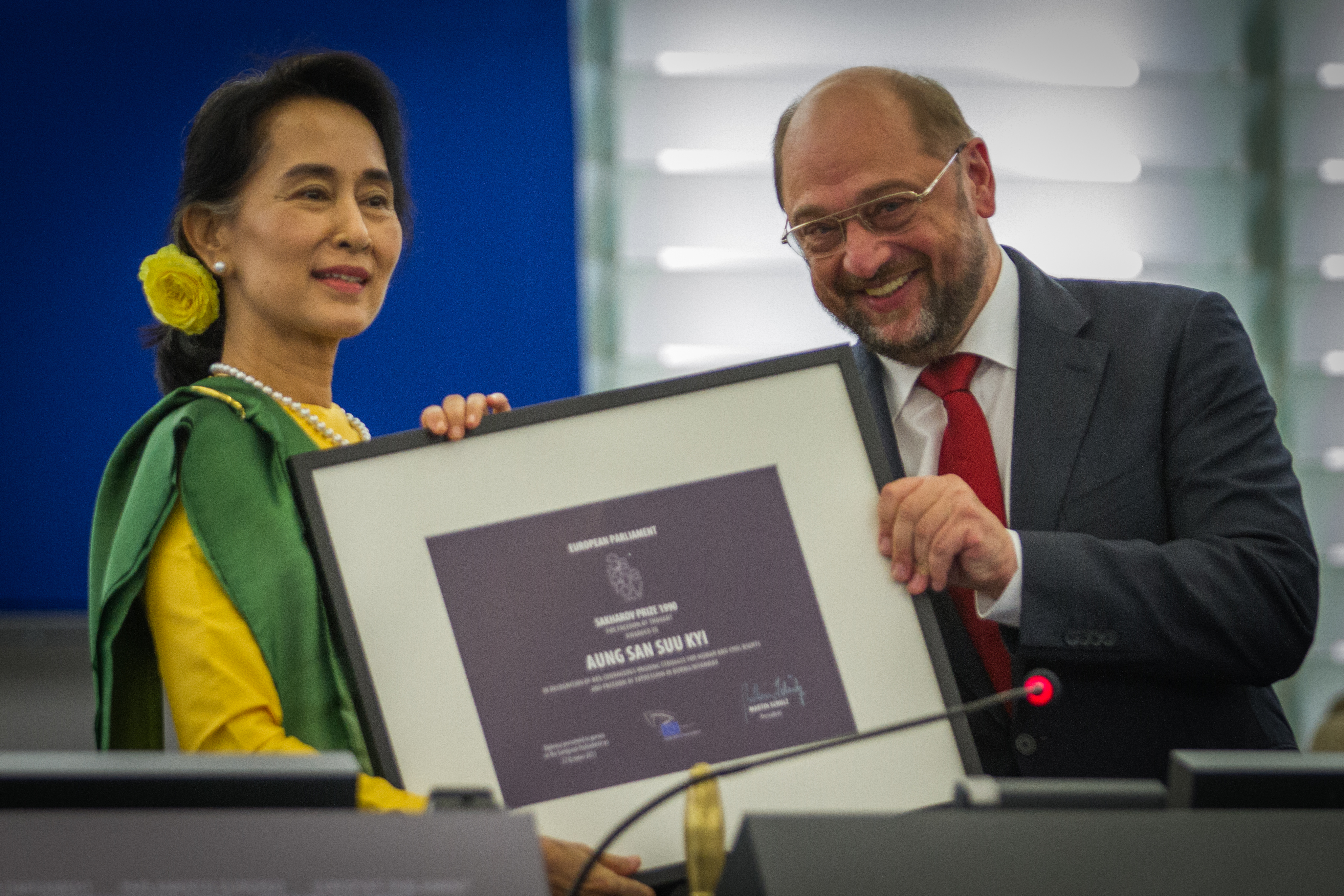 Remise du prix Sakharov à Aung San Suu Kyi par Martin Schulz au Parlement européen à Strasbourg le 22 octobre 2013.